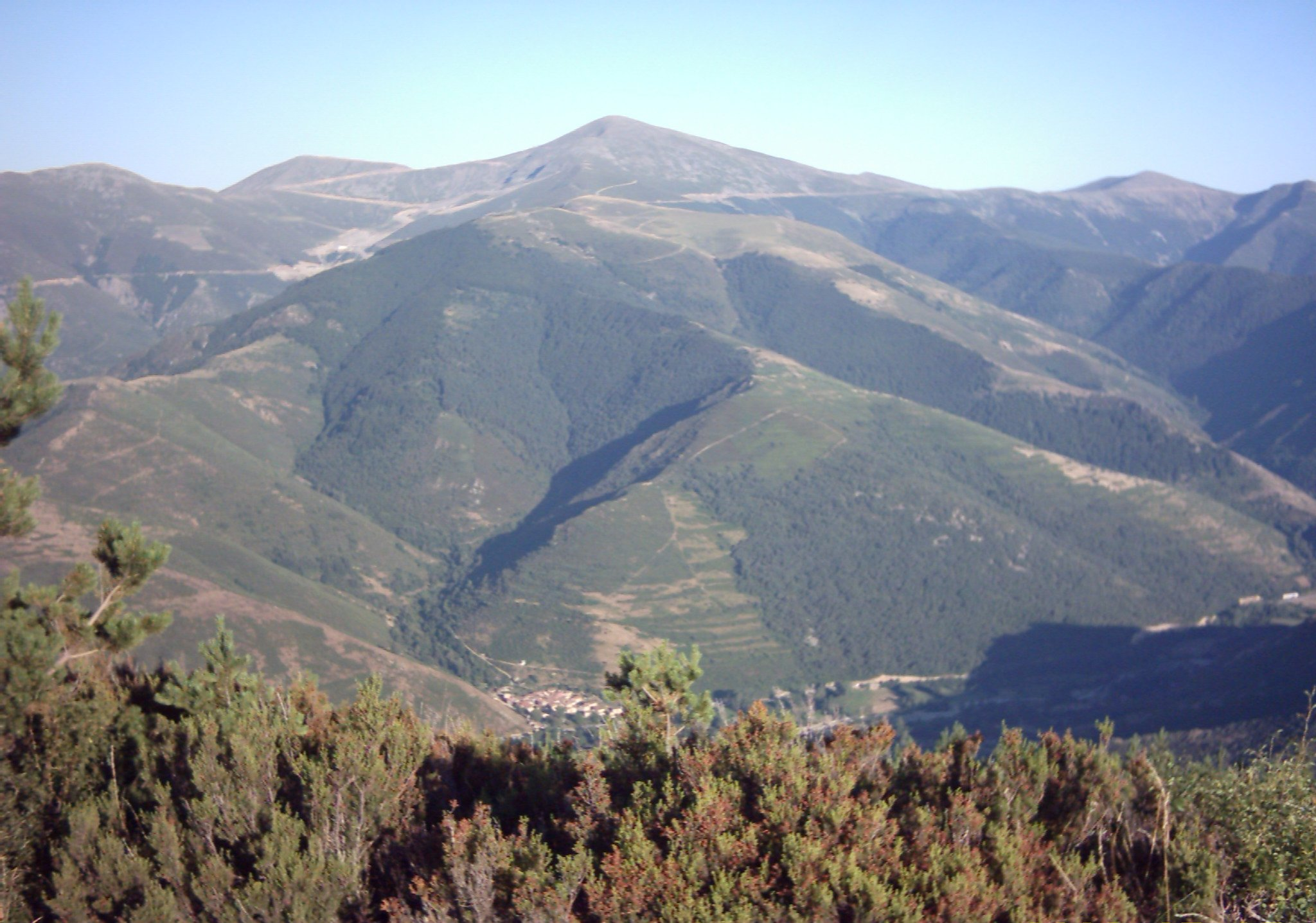 Vista de el Monte San Lorenzo, en la Sierra de la Demanda, desde El Hombre.